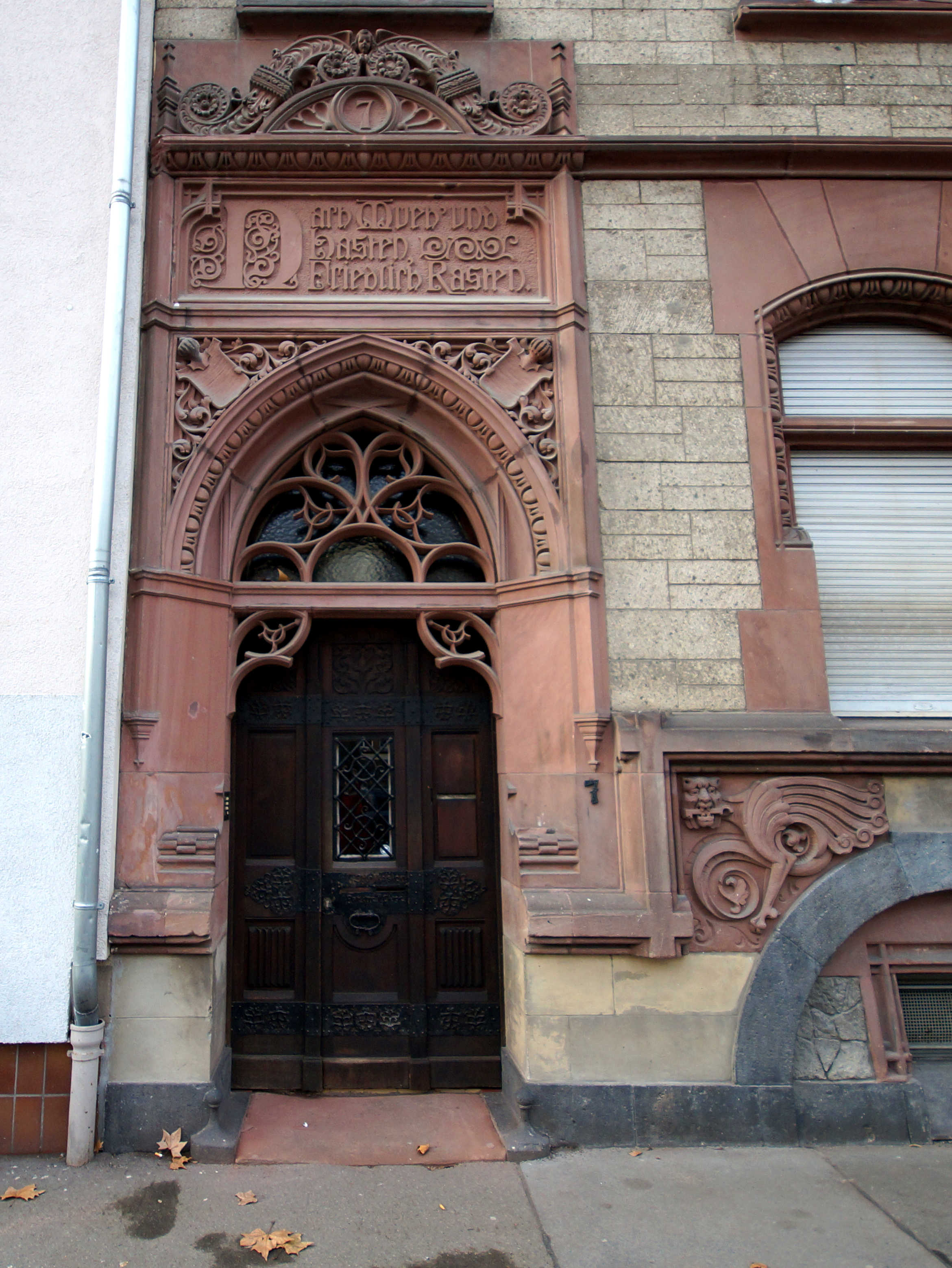 Die Eingangstür des Feldberplatzes 7 in Mainz. Über der Tür steht in einer Tafel: „NACH MUEH’ UND LASTEN/FRIEDLICH RASTEN“